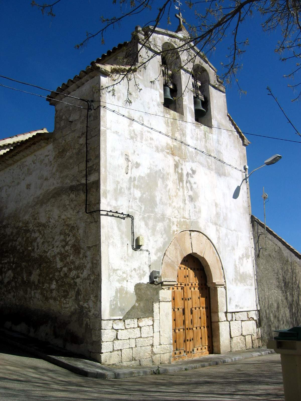 Vista fronto-lateral izquierda (noroccidental) de la iglesia de Santa Elena en Pedro Izquierdo de Moya (Cuenca), año 2013.